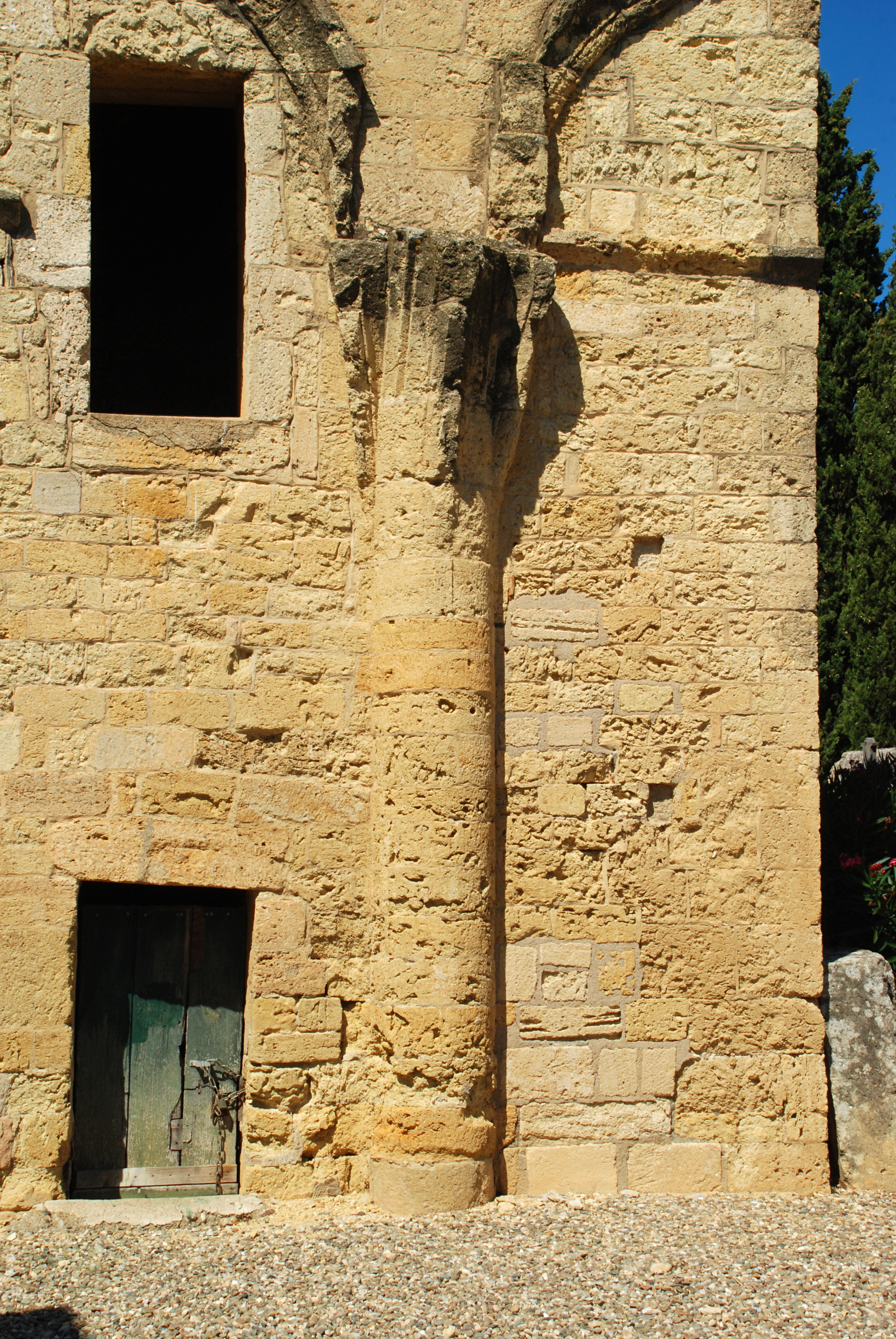 France - Languedoc - Hérault - Puissalicon - ancienne église Saint-Étienne-de-Pézan - tour romane .